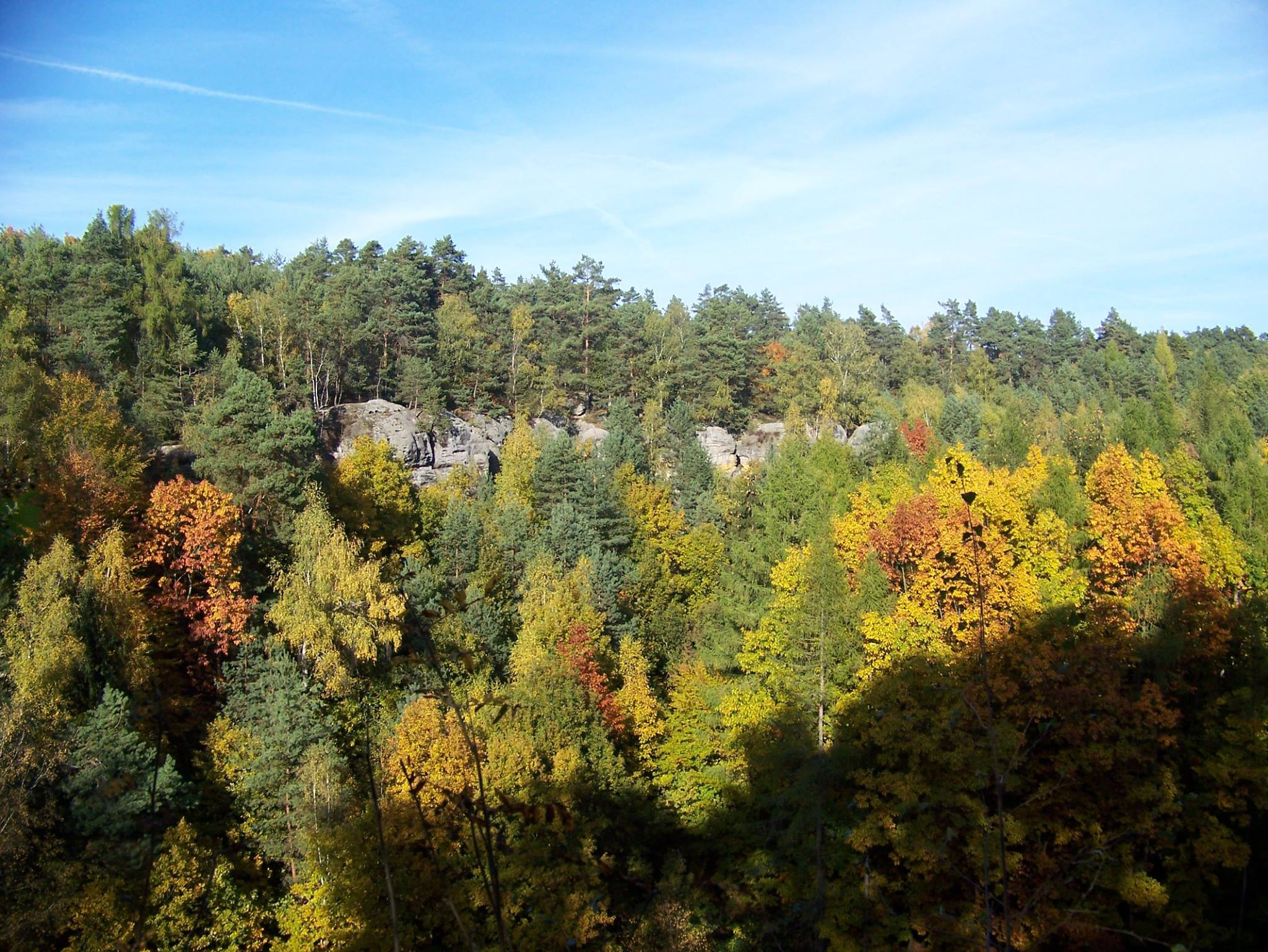 Borecké skály, část rovenské kuesty.